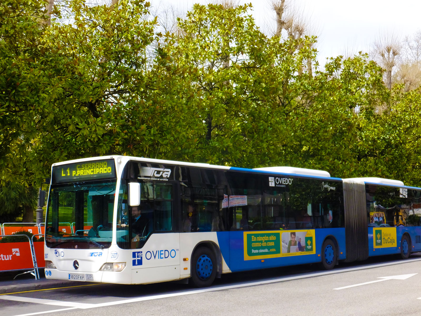 Bus urbano de la línea 1 de Oviedo.